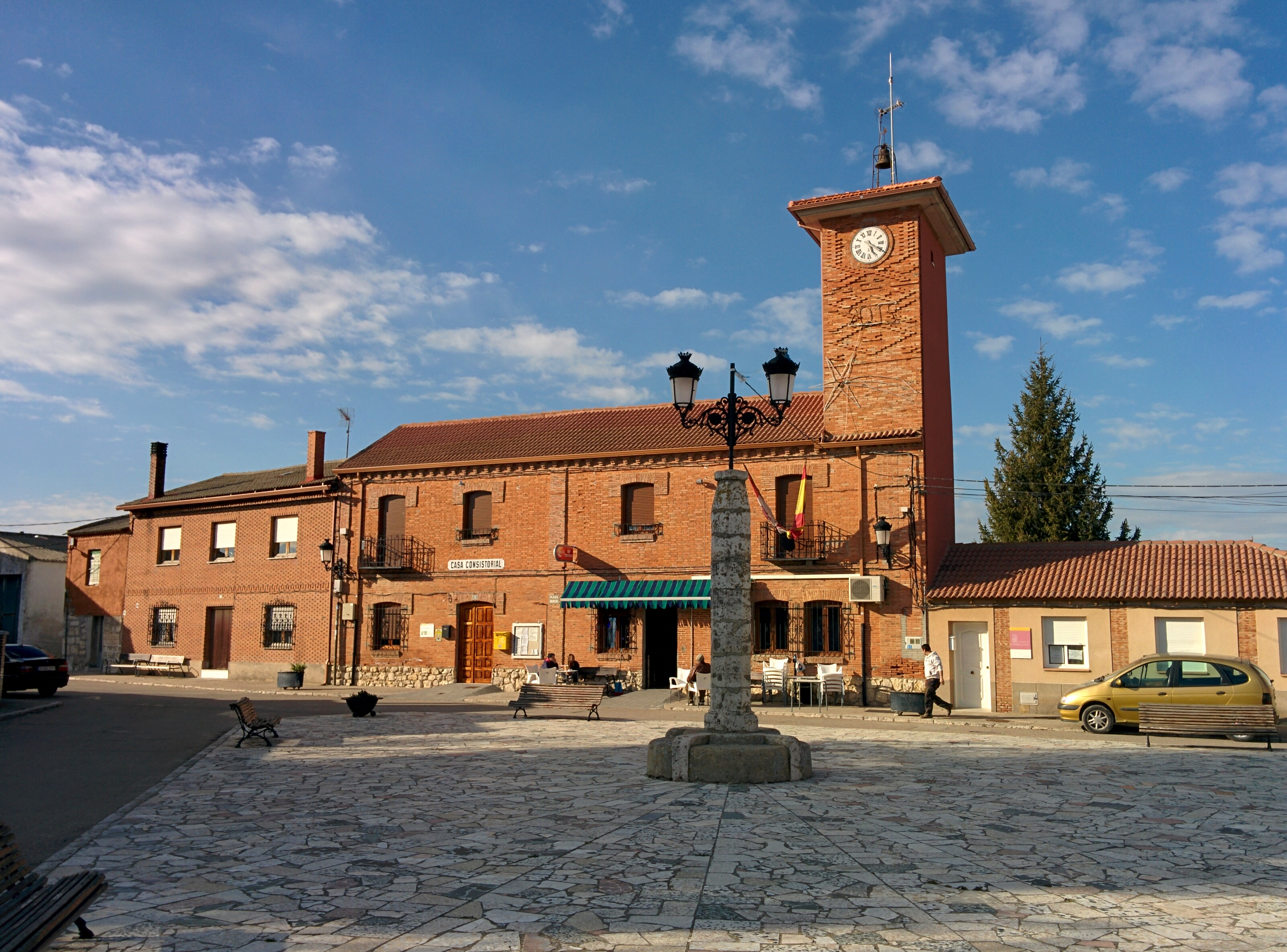 Ayuntamiento de Población de Cerrato (Palencia, España).